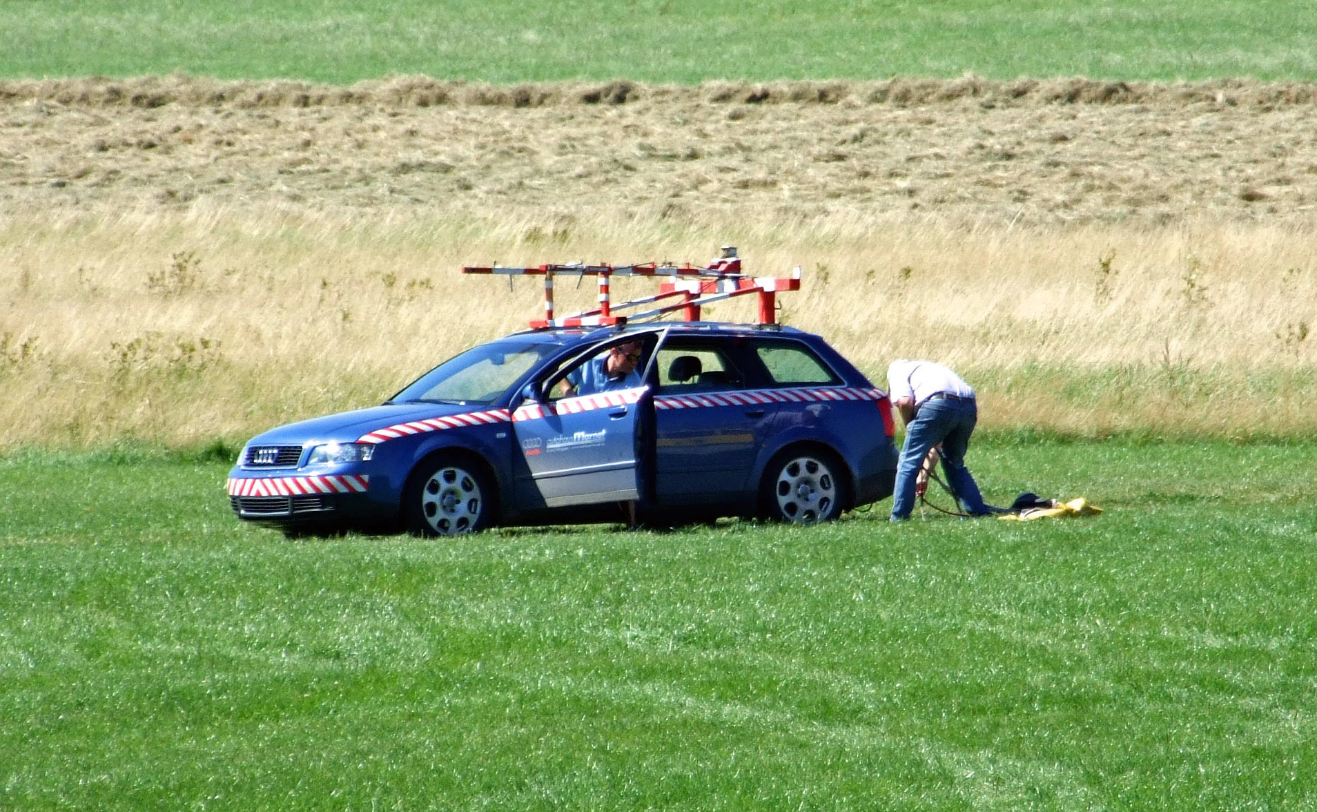 Pendel- und Rückholfahrzeug fuer Schleppseil und Flugzeuge, Flugplatz Anspach Taunus